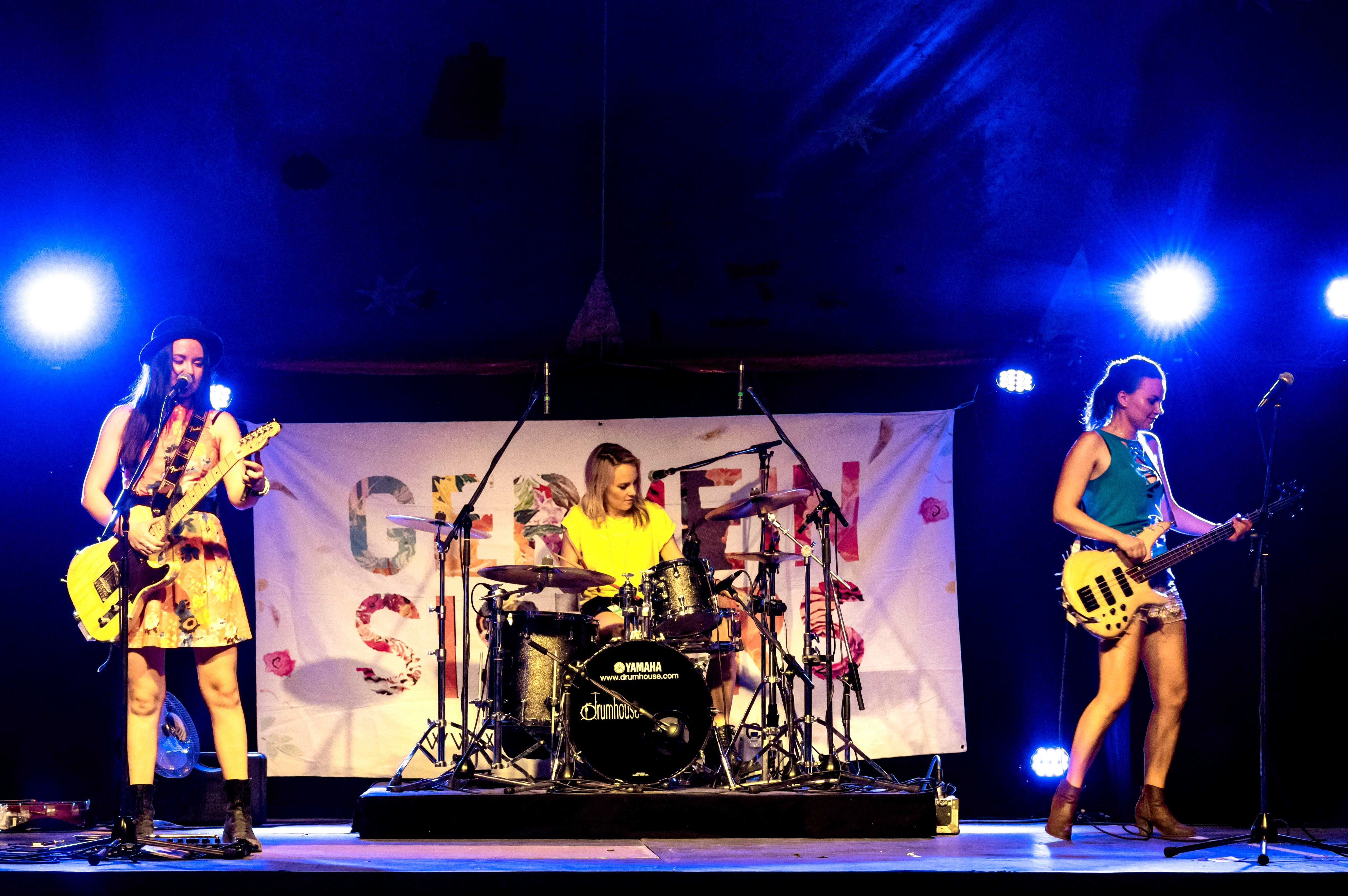 Bilder vom ZMF 2015 Germein Sisters (Australien) Georgia, Singer-Songwriter Ella, Bass/Synthesizer, Backgroundgesang Clara Schlagzeug, Backgroundgesang